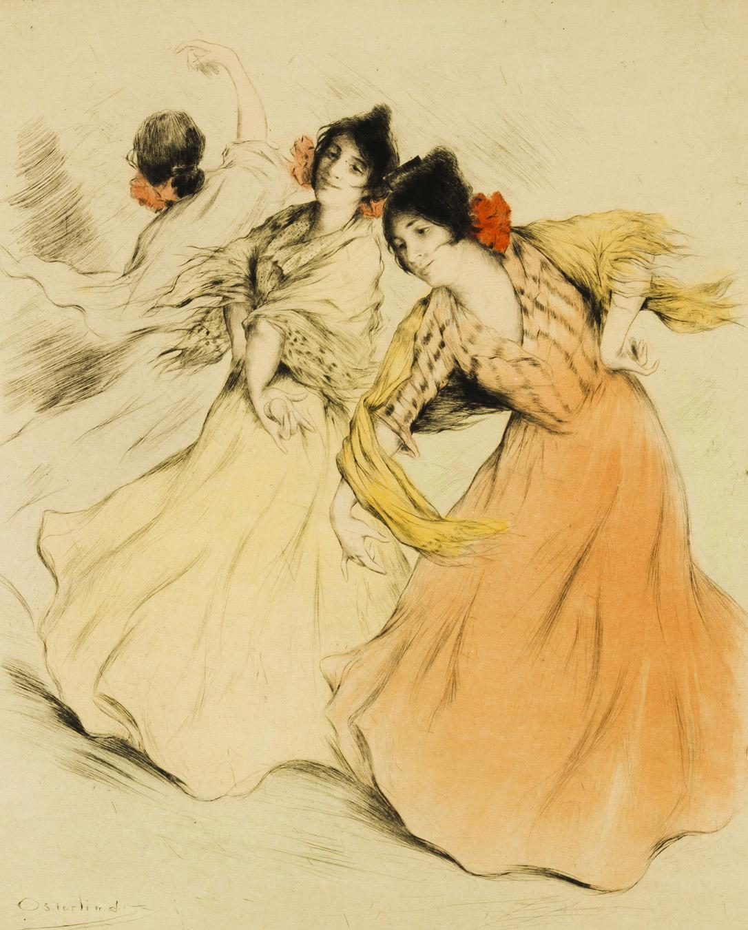 Flamencotänzerin